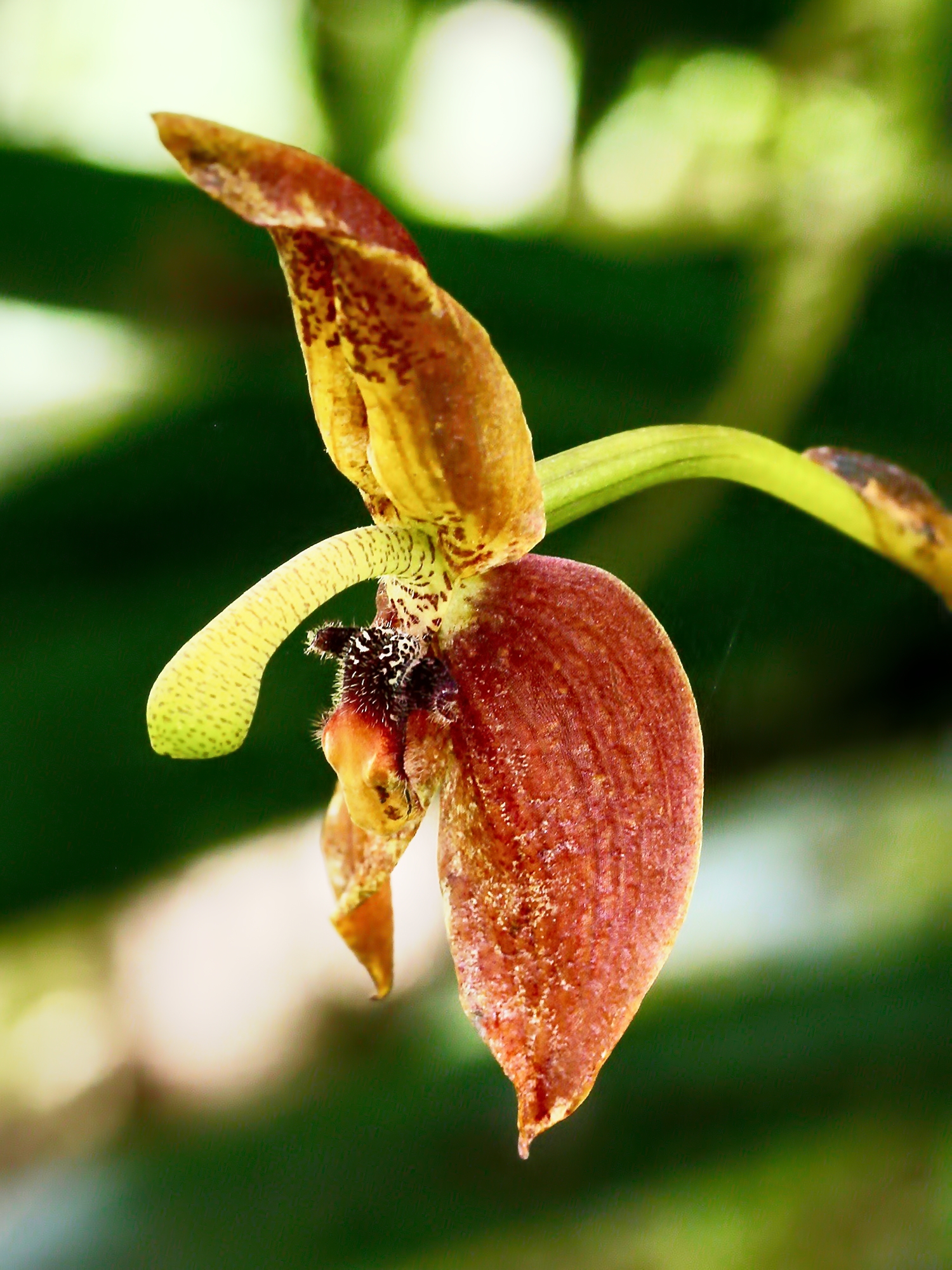 Maxillaria schlimii, Ecuador, Pichincha, Mindo, Rio Bravo Reserve